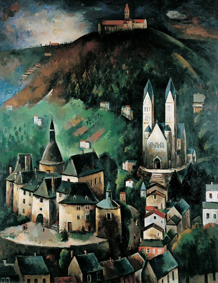 Clervaux